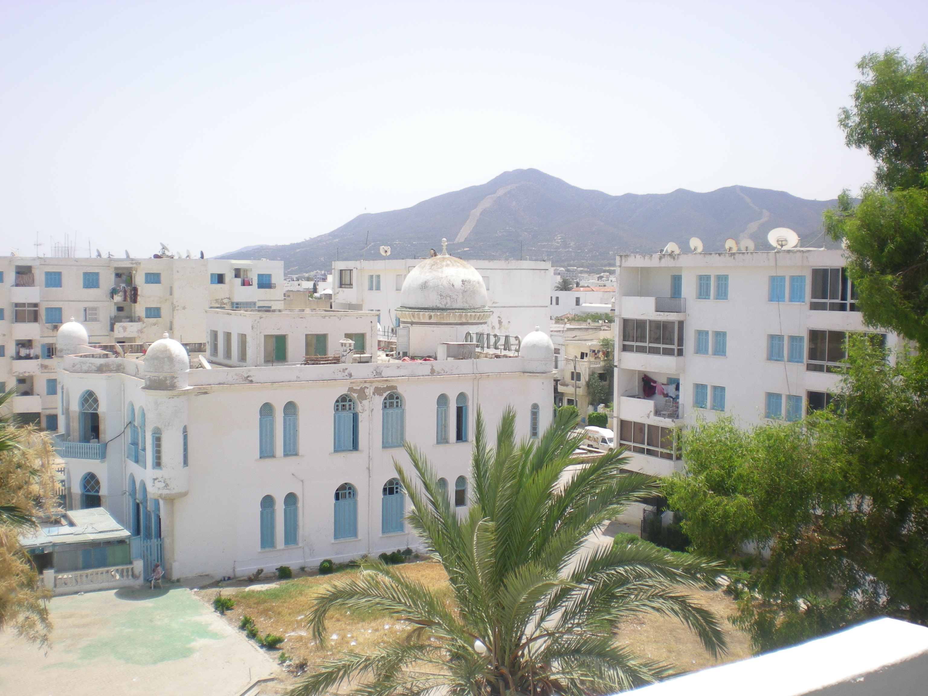 Le casino de Hammam-lif, banlieue sud de Tunis